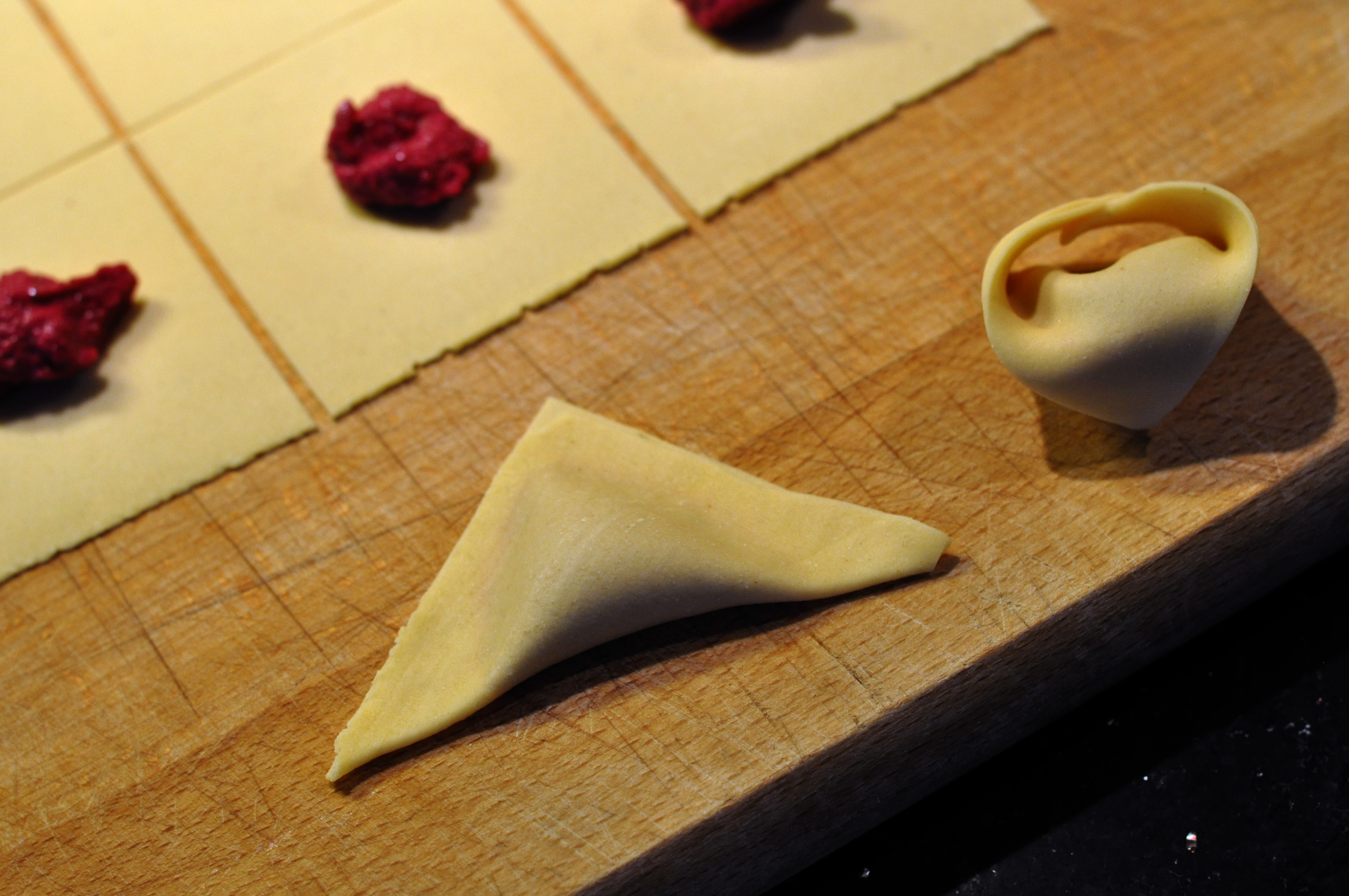 Tortellini med rødbeder og ricotta